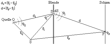 {Skizze zum Beugungsintegral mit Beschriftungen }